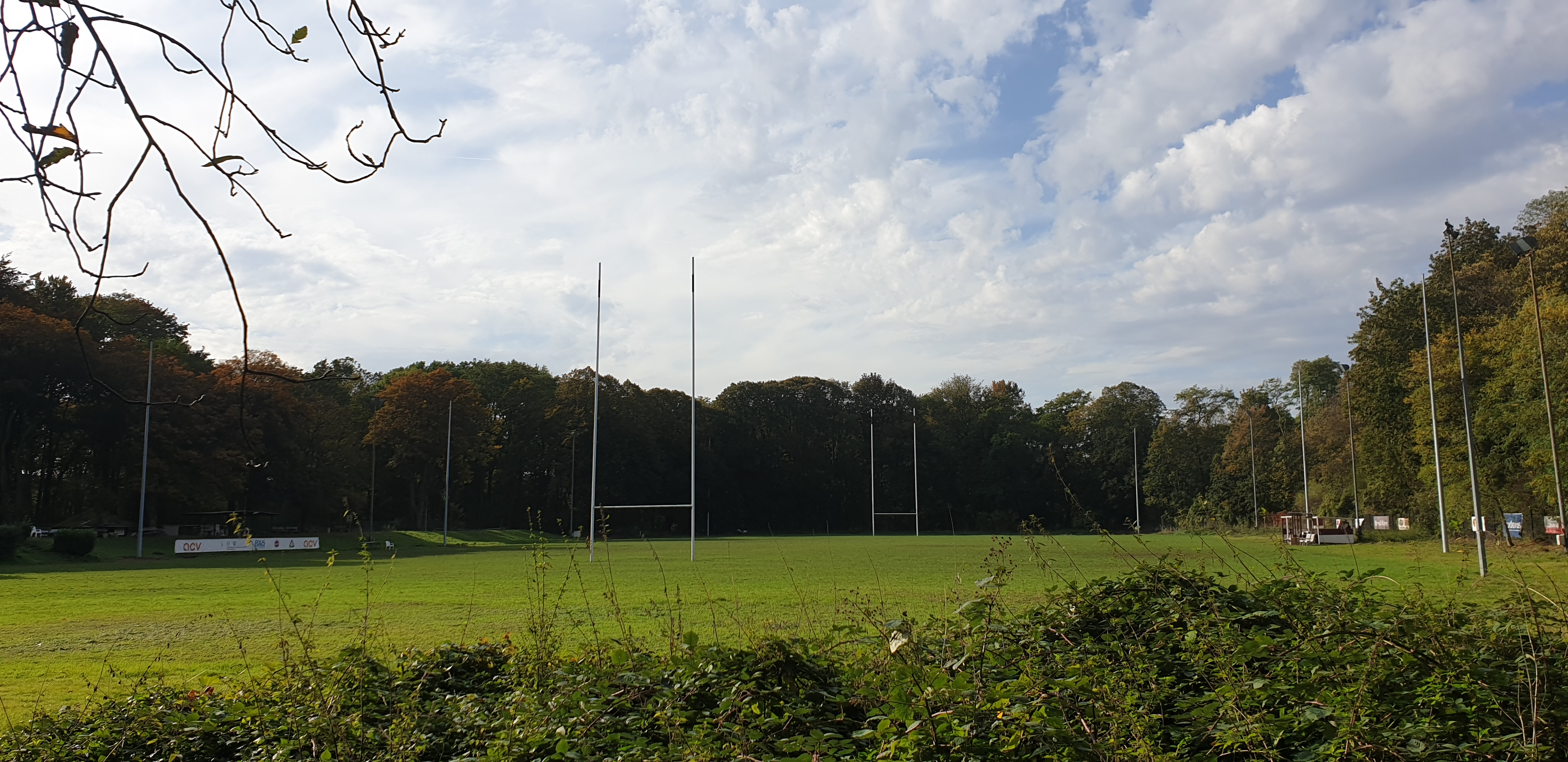 Spielfeld des Kölner Rugby-Parks am äußeren Grüngürtel im Stadtteil Klettenberg.